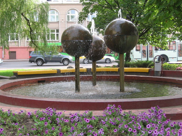 Минск. На пересечении улиц Свердлова и Ульяновской, возле БГТУ.